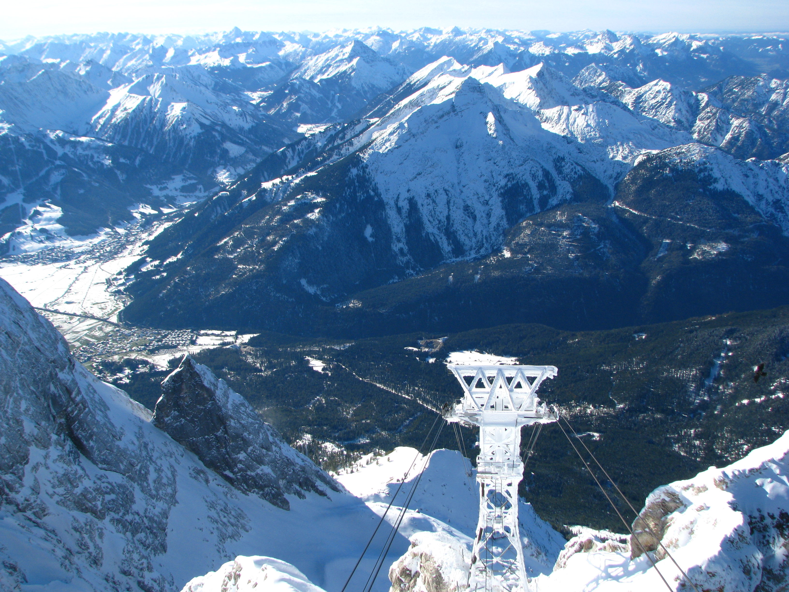 Der Berg Daniel (2340 m) vom Gipfel der Zugspitze (2962 m) aus gesehen. Im Vordergrund eine Stütze der Tiroler Zugspitzbahn und am Fuß die österreichische Ortschaft Ehrwald.